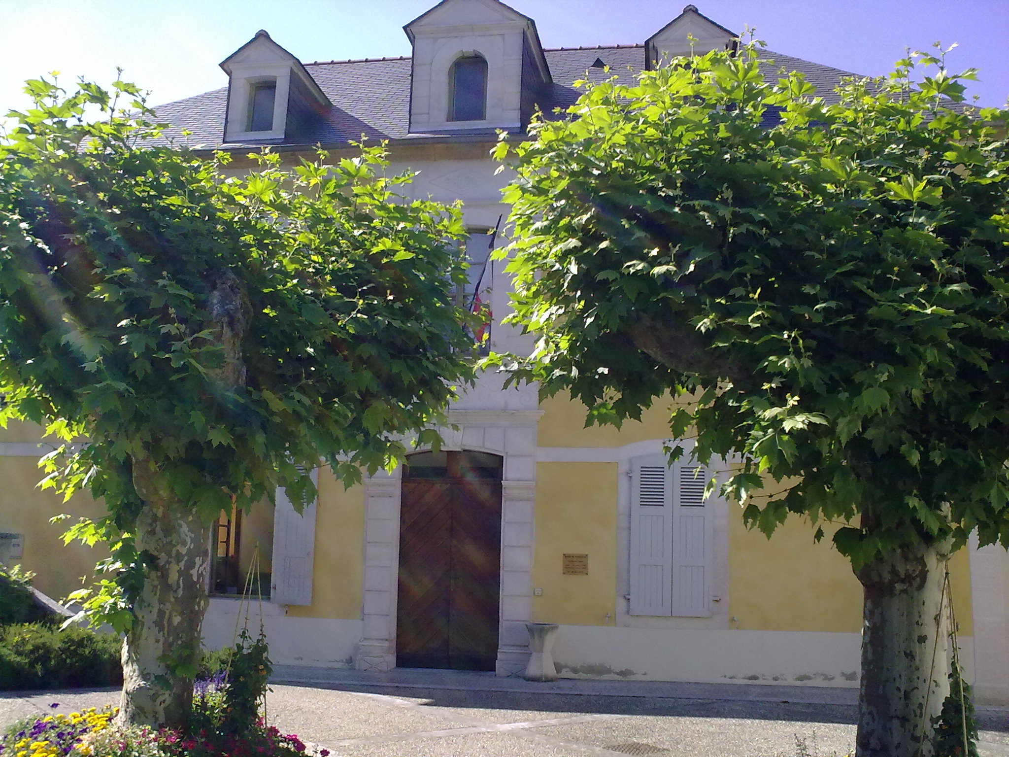 Mairie de Bourdettes.